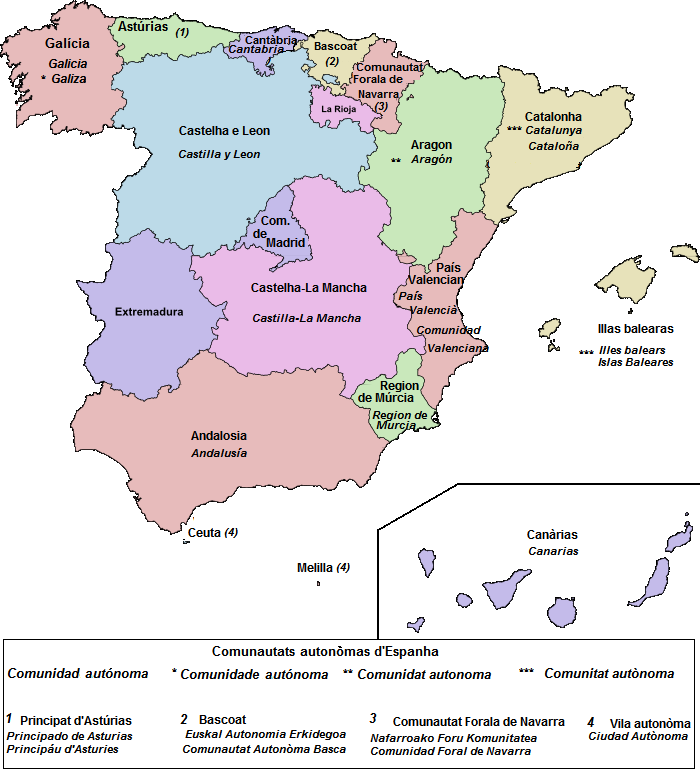 Mapa de la Comunautats autonòmas d'Espanha